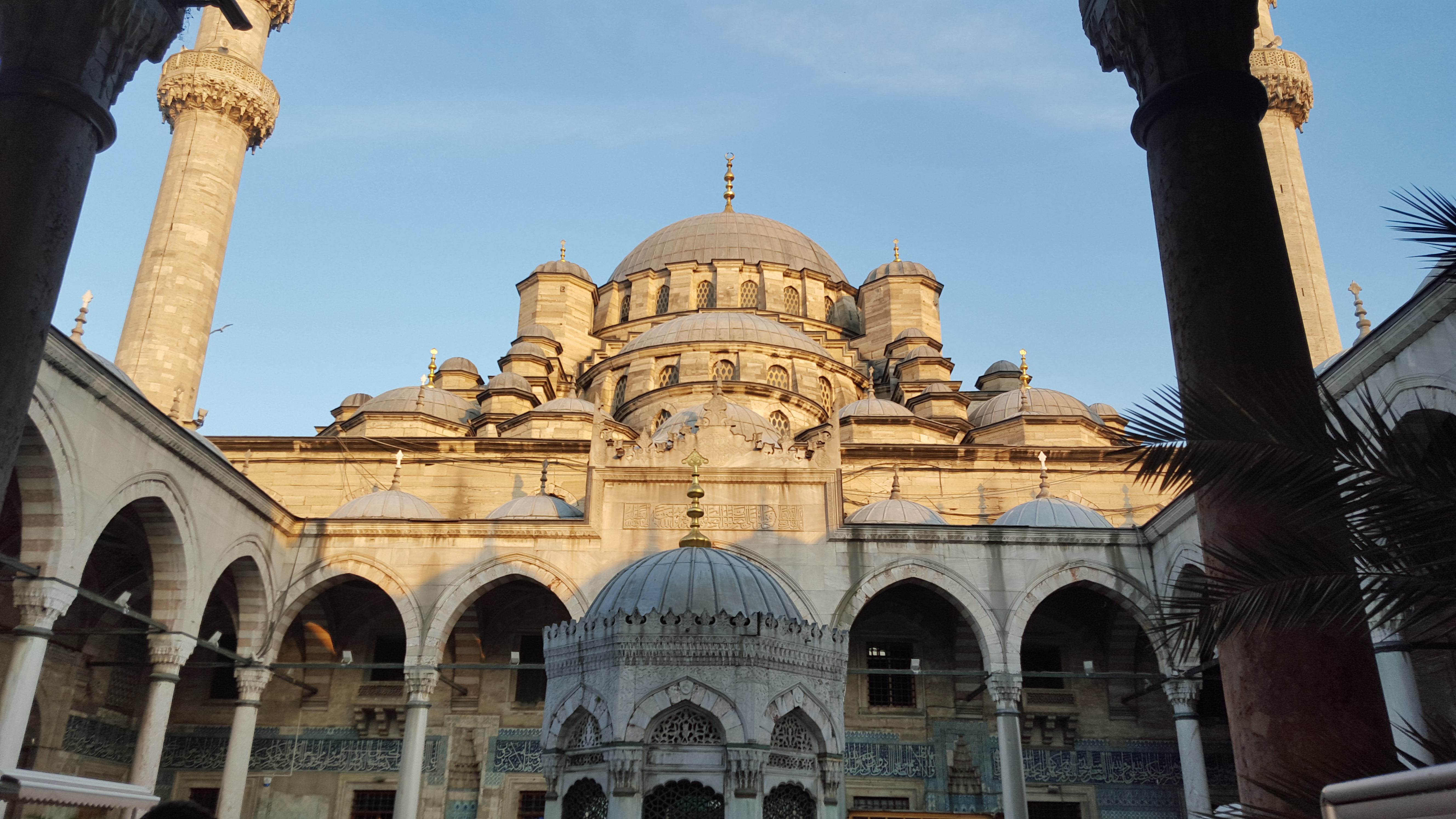 חזית מסגד הסולימאניה באיסטנבול